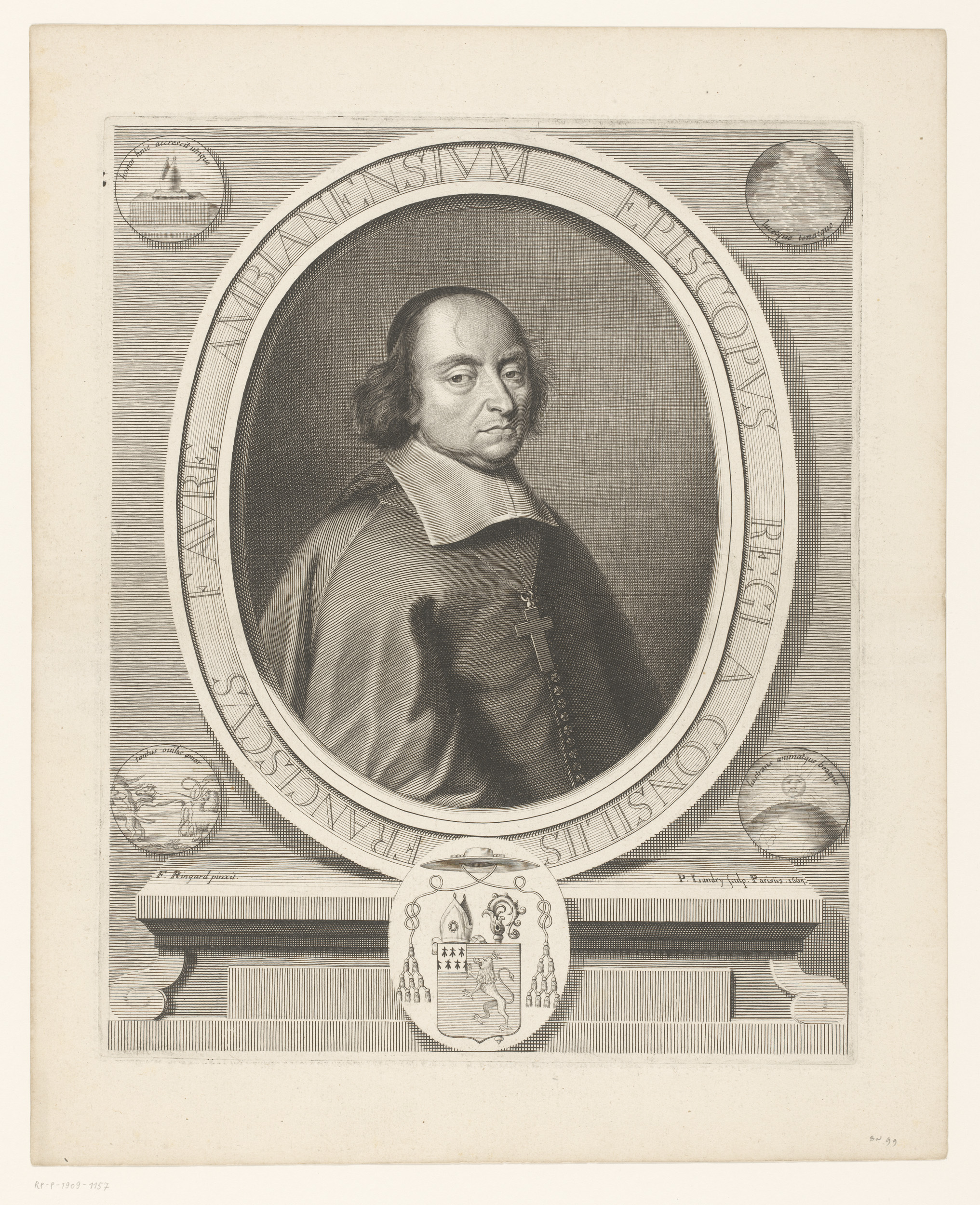 IdentificatieTitel(s): Portret van François FaureObjecttype: prent Objectnummer: RP-P-1909-1157Catalogusreferentie: IFF 17e siècle 99Opschriften / Merken: verzamelaarsmerk, verso, gestempeld: Lugt 2228VervaardigingVervaardiger: prentmaker: Pierre Landry (vermeld op object)naar schilderij van: F. Ringard (vermeld op object)Plaats vervaardiging: ParijsDatering: 1664Materiaal: papier Techniek: etsen / graveren (drukprocedé)Afmetingen: plaatrand: h 347 mm × b 279 mmOnderwerpWat: historical personsarchbishop, bishop, etc. (Roman Catholic)armorial bearing, heraldryWie: François FaureVerwerving en rechtenVerwerving: aankoop 1909Copyright: Publiek domein